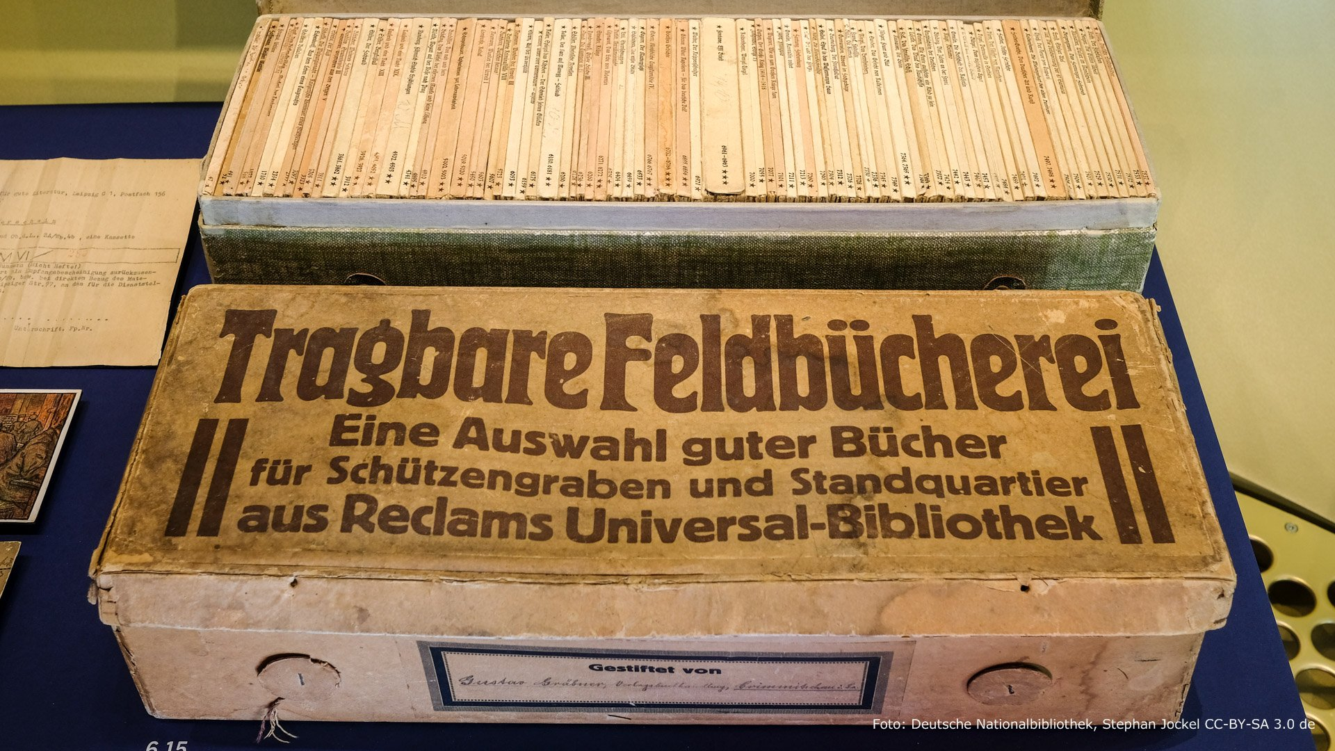 "Tragbare Feldbücherei" der Universalbibliothek des Reclam-Verlags aus dem Ersten Weltkrieg (unten) und aus dem Zweiten Weltkrieg (oben). Fotografiert in der Ausstellung "Universal. Reclams Jahrhundertidee – Leipzig 1867 bis 1990" im Deutschen Buch- und Schriftmuseum, Leipzig, 27. Oktober 2017 bis 3. Juni 2018